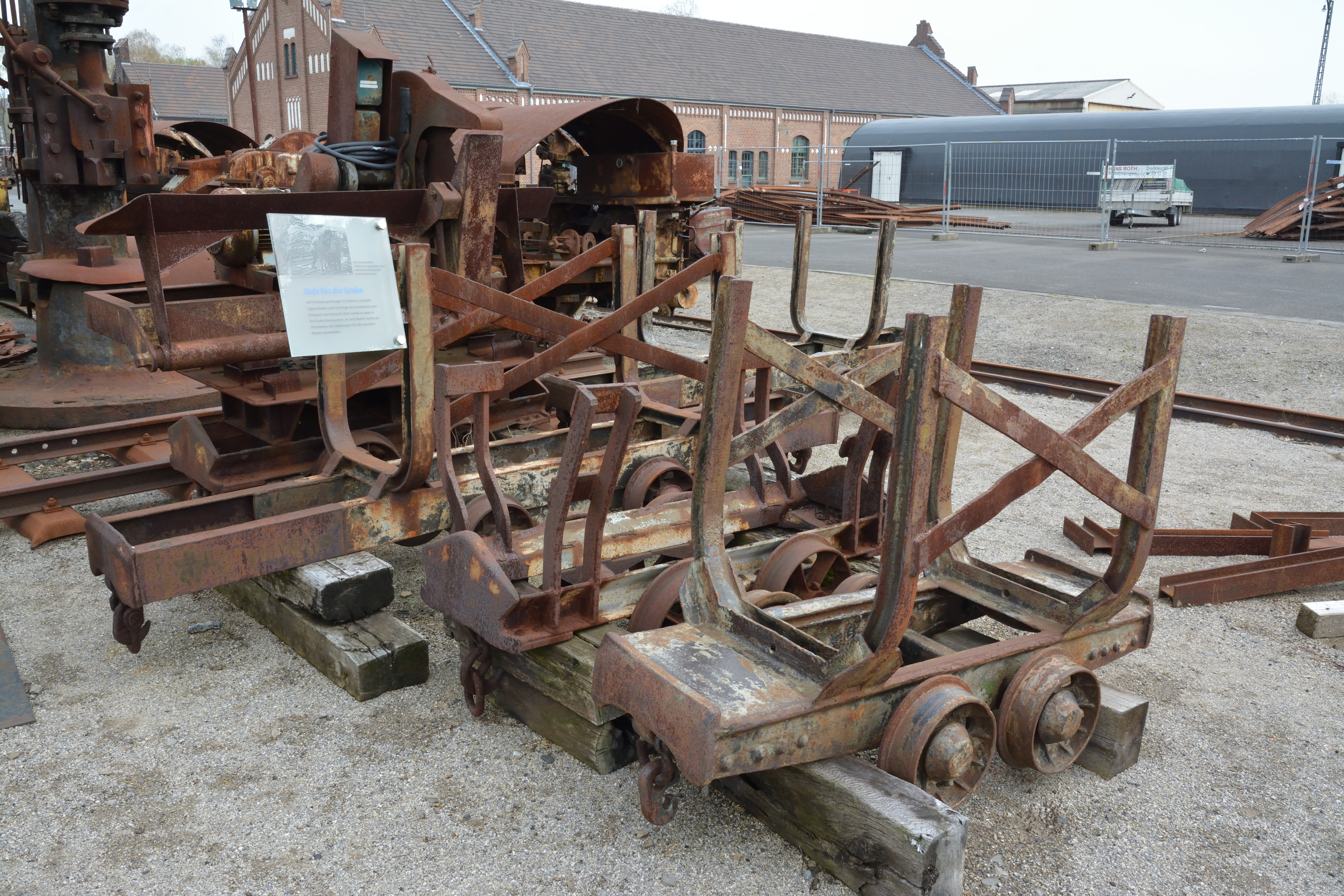 Impressionen von der Zeche "Zollern 2/4" in Dortmund. Hier: Sogenannte "Teckel", Loren zur Beförderung von Grubenholz auf dem Freigelände der Zeche.